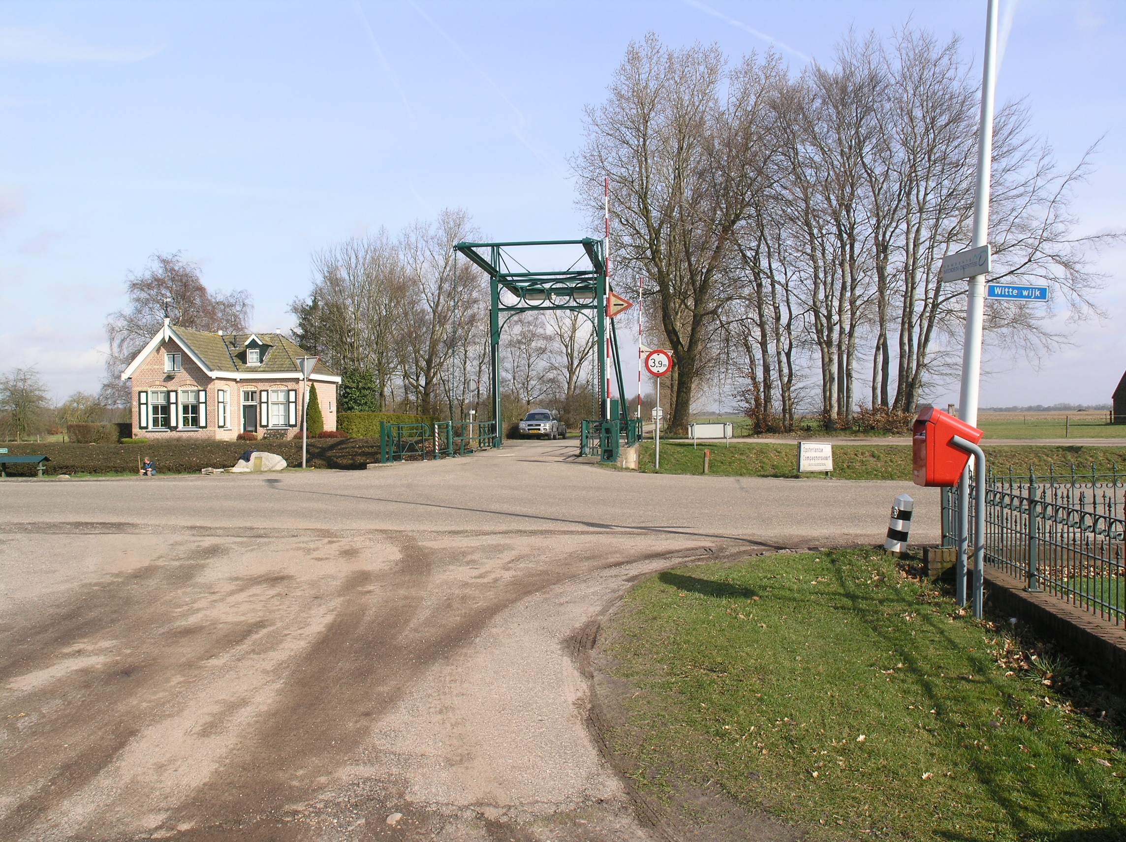 sluiswachtershuis en brug bij de Damsluis